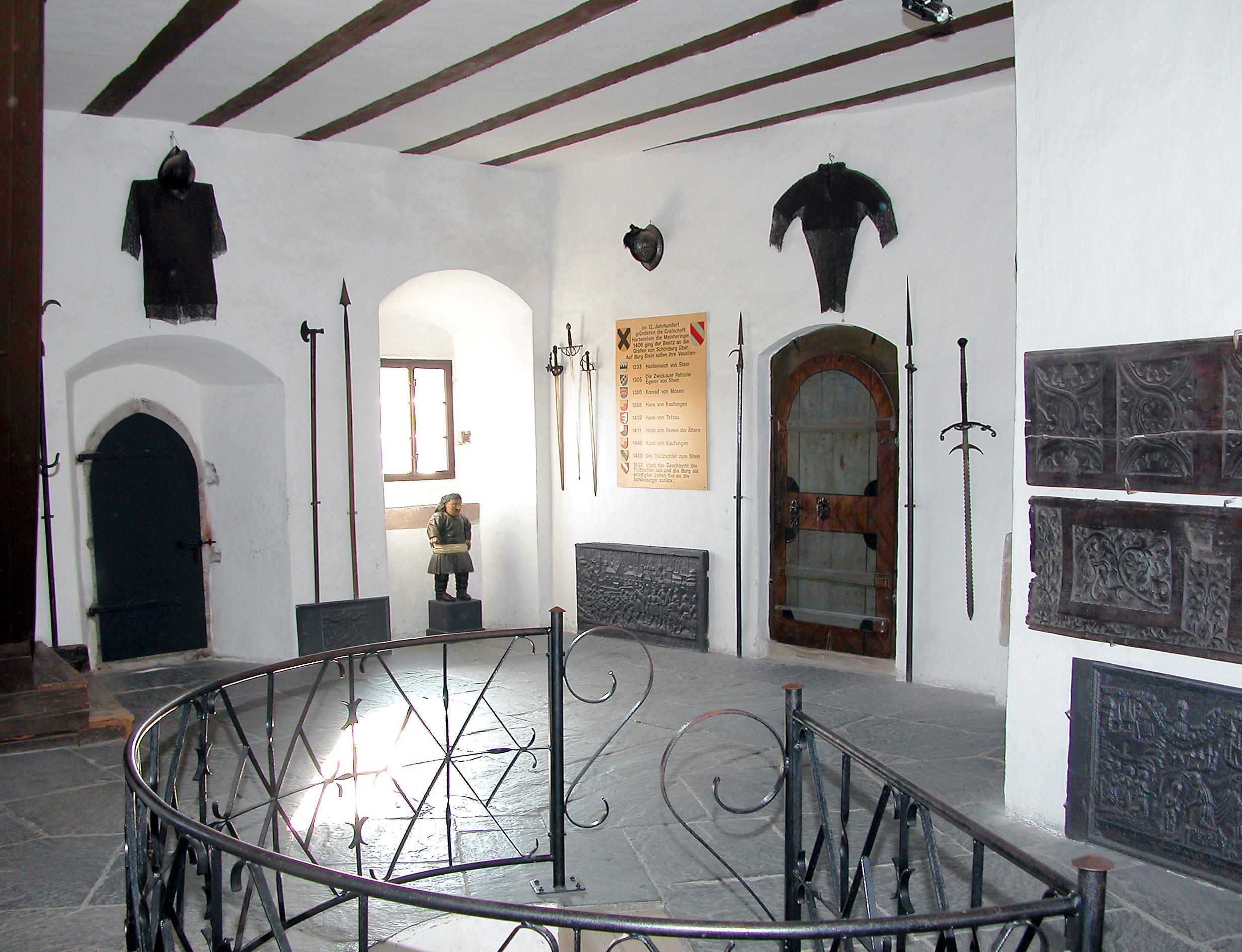 16.10.2007 08118 Stein (Hartenstein), Stein 1: Burg Stein (ab 12. Jh.). Museumsraum im obersten Geschoß. [DSCN30802.TIF]20071016640DR.JPG(c)Blobelt